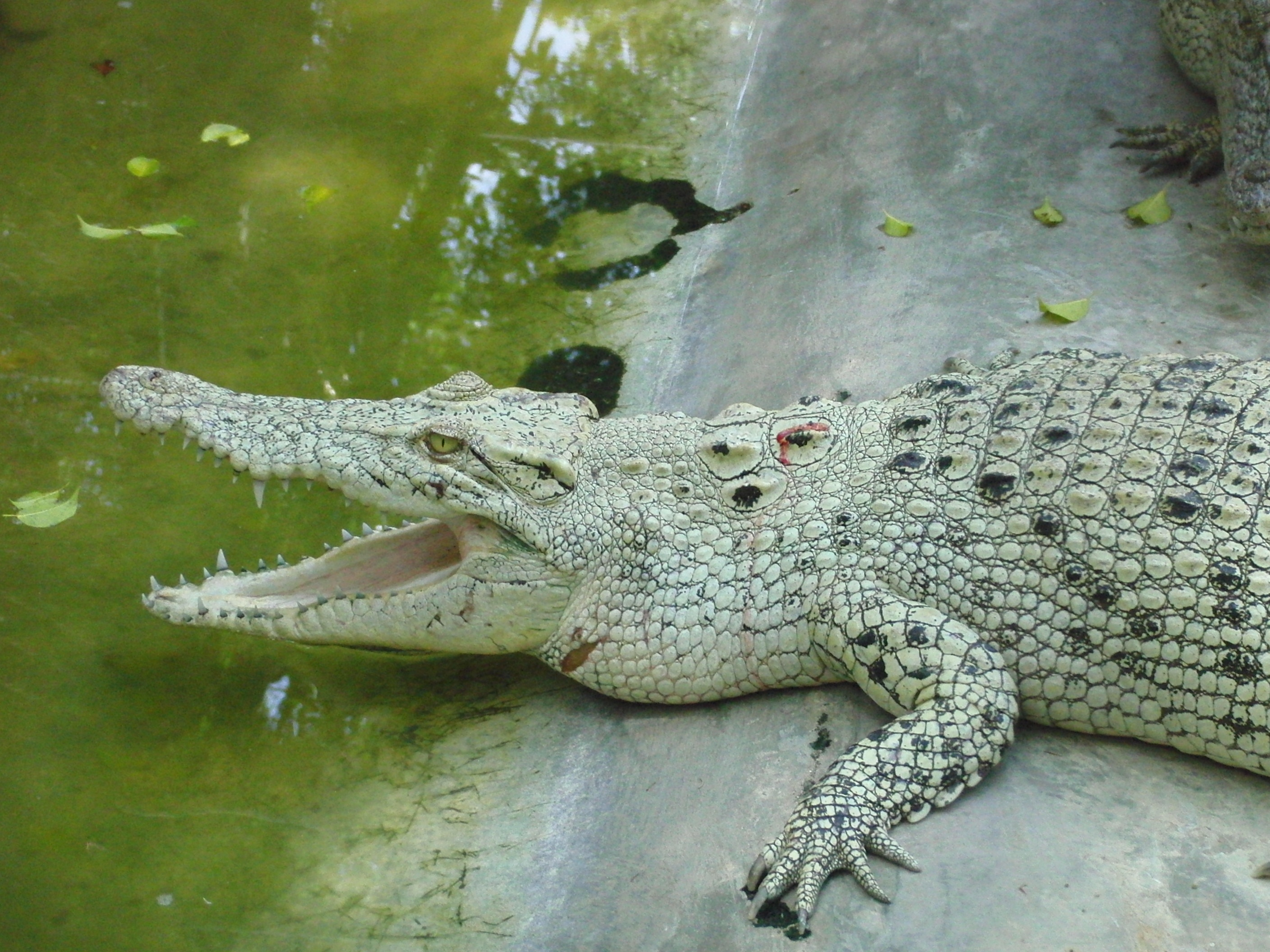 Крокодиловая ферма, Китай